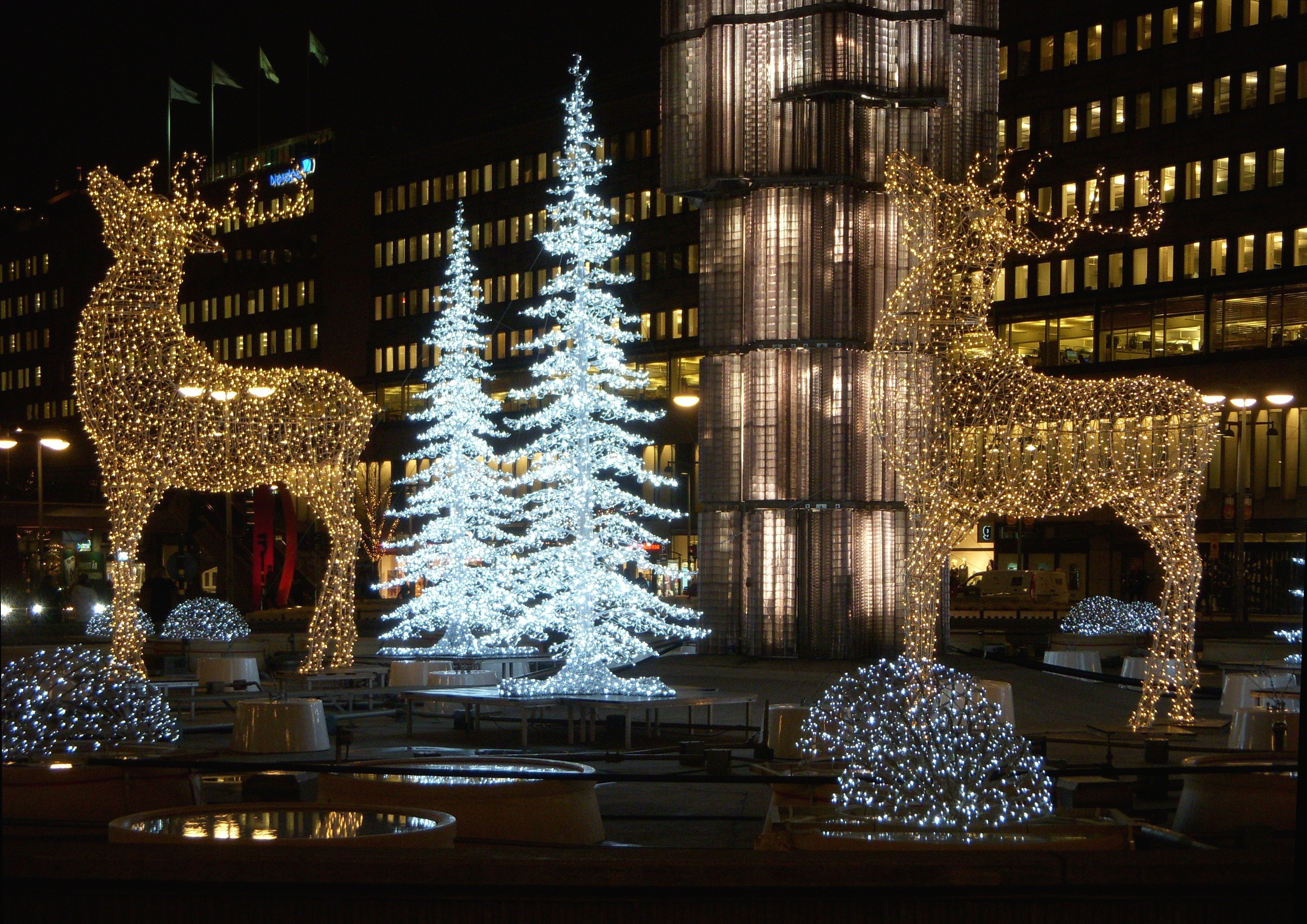 Sergelfontänen med juldekorationer